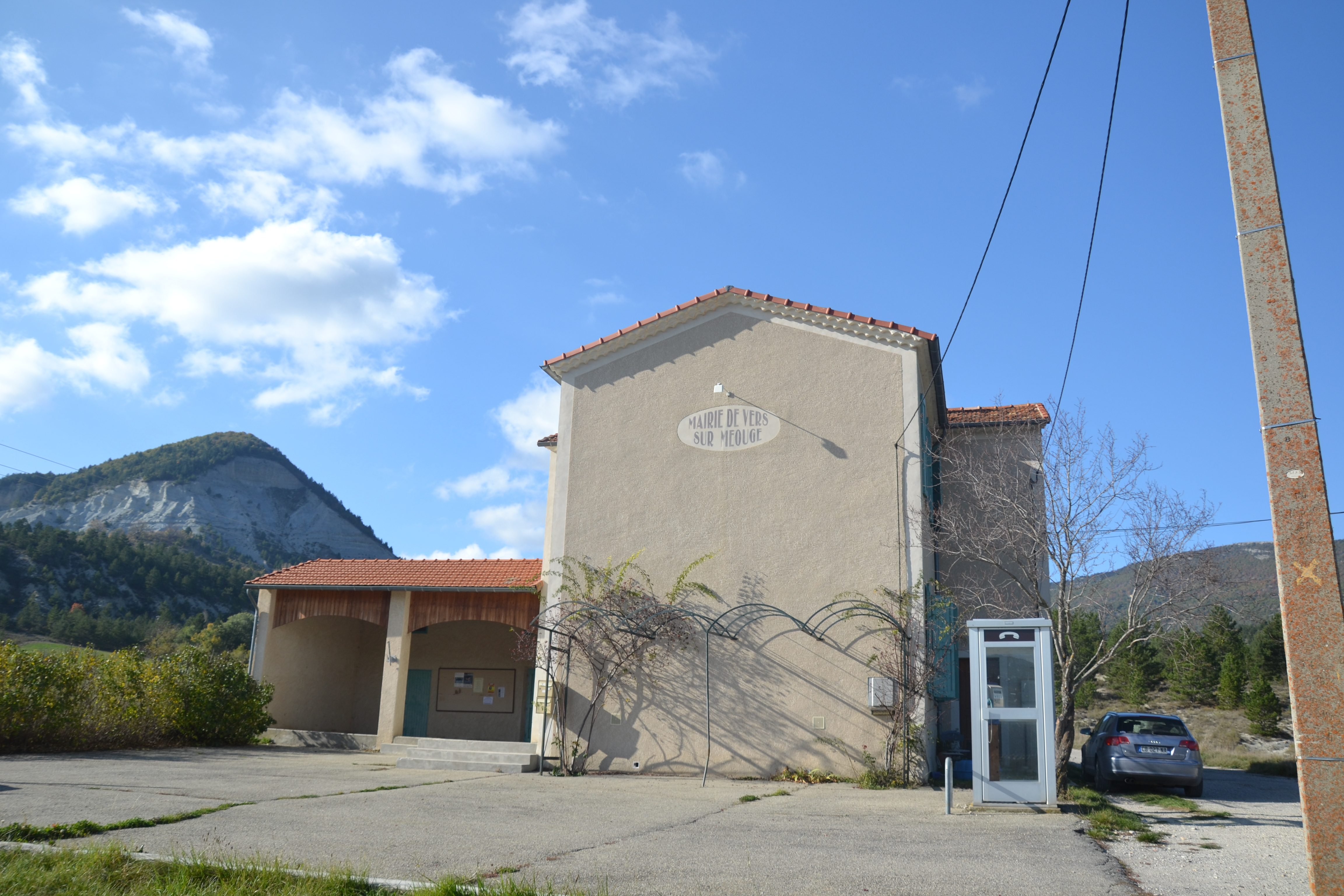 Mairie de Vers-sur-Méouges